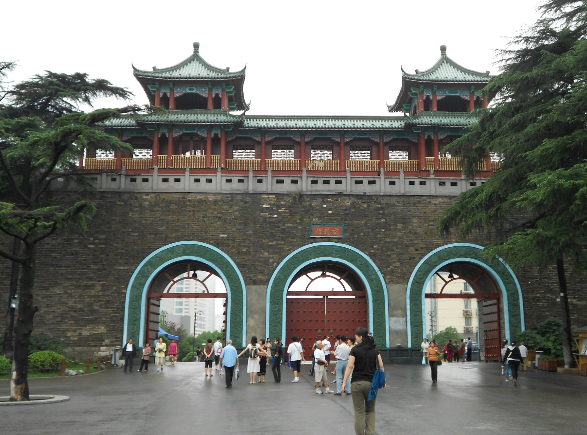 南京玄武門